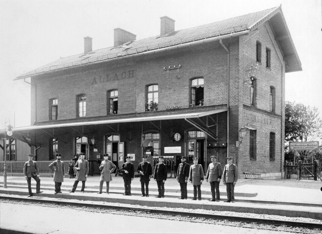 Empfangsgebäude des Bahnhofs Allach von der Gleisseite, unter dem Vordach unterhalb der Uhr das Kurbelstellwerk der Bauart Krauß von 1885